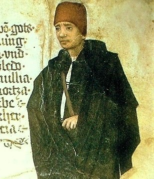 Enrique IV de Castilla, llamado "El Impotente", hermano y antecesor de Isabel la Católica. Miniatura tomada del manuscrito del "Itinerarium" escrito por el alemán Georg von Ehingen: Wurtemberg Land.Bibl. Cod.hist.qt.141. S.85